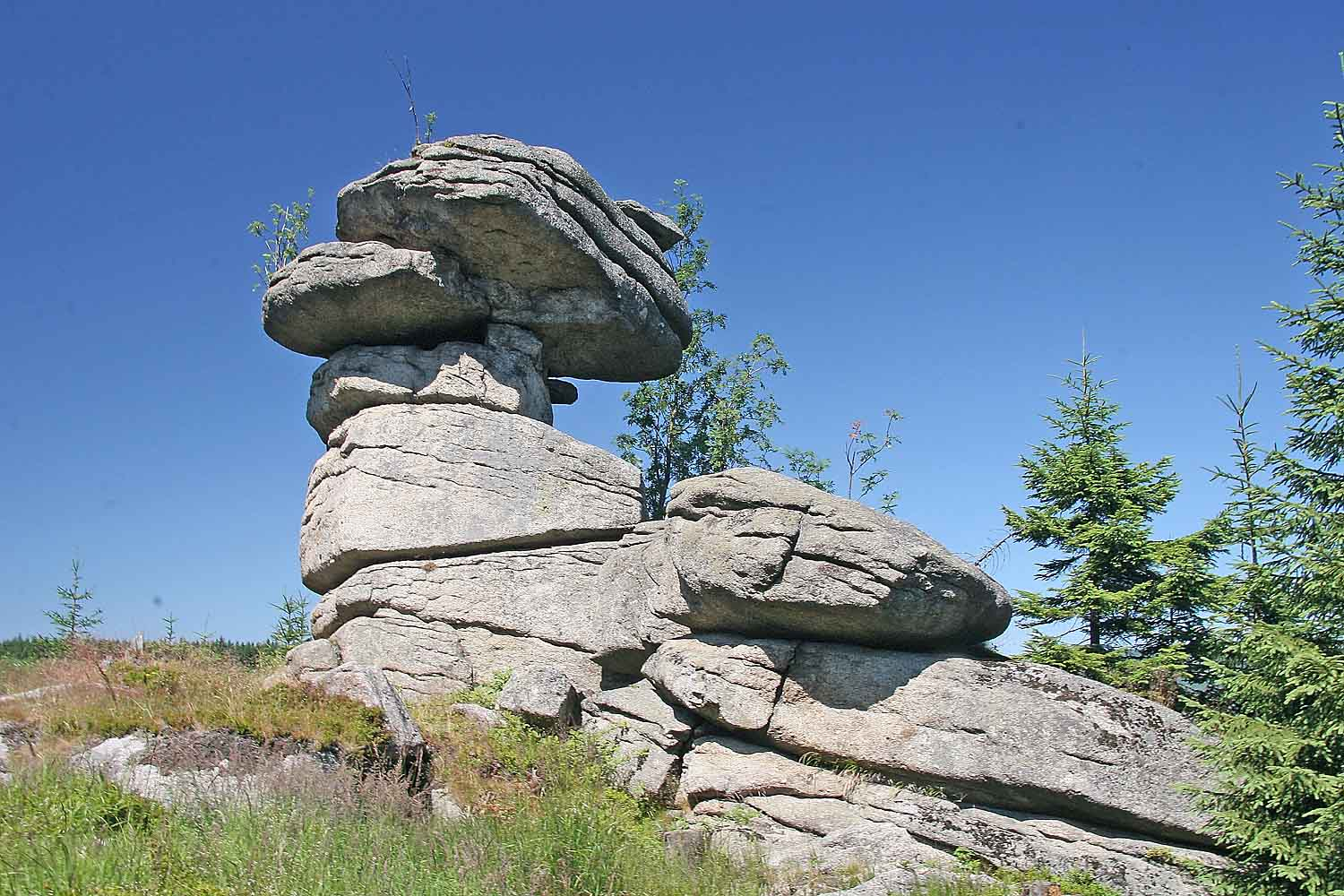 Skalní útvar Houba u Pytláckých kamenů, Jizera Mountains, Czech Republic Autor:Prazak Date: 18. 7. 2006